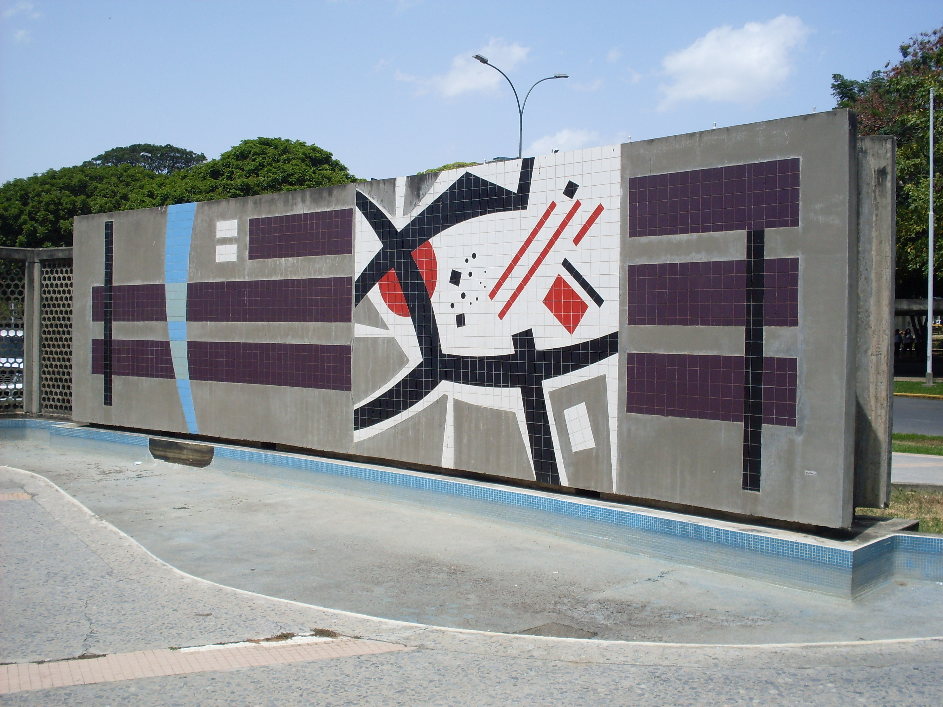 Mural de Mateo Manaure, 1954.. Título: Sin título. Autor: Mateo Manaure. Año: 1954. Ubicación: Universidad Central de Venezuela, Plaza cubierta del Rectorado